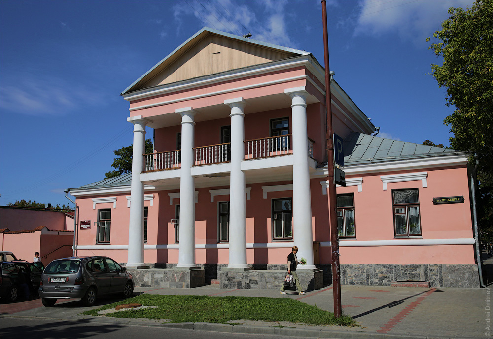 Брэст. Замалёўкі